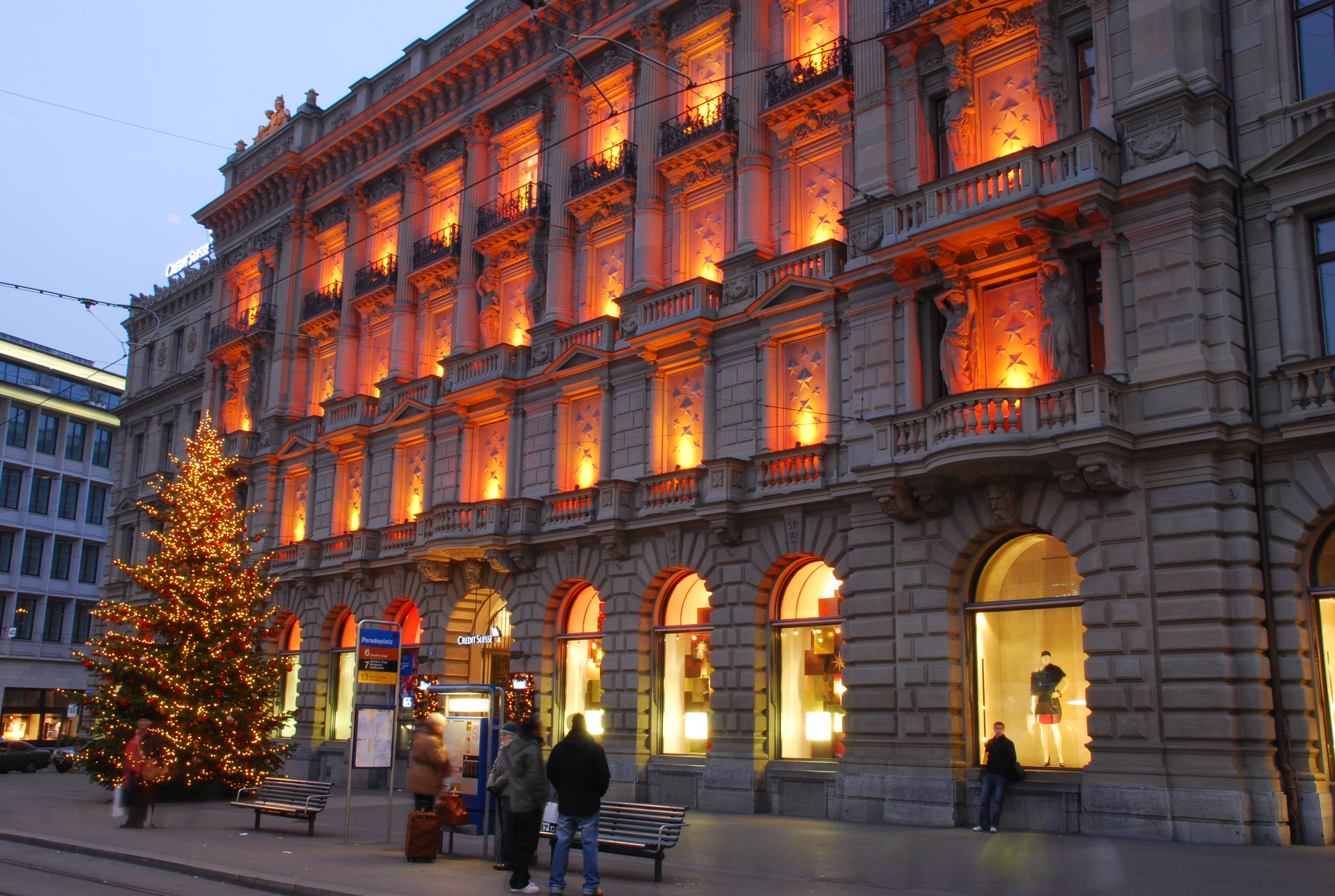 Credit Suisse Gebäude beim Paradeplatz in Zürich